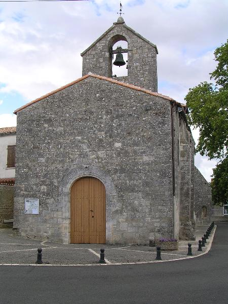 église de Houlette, Charente, France